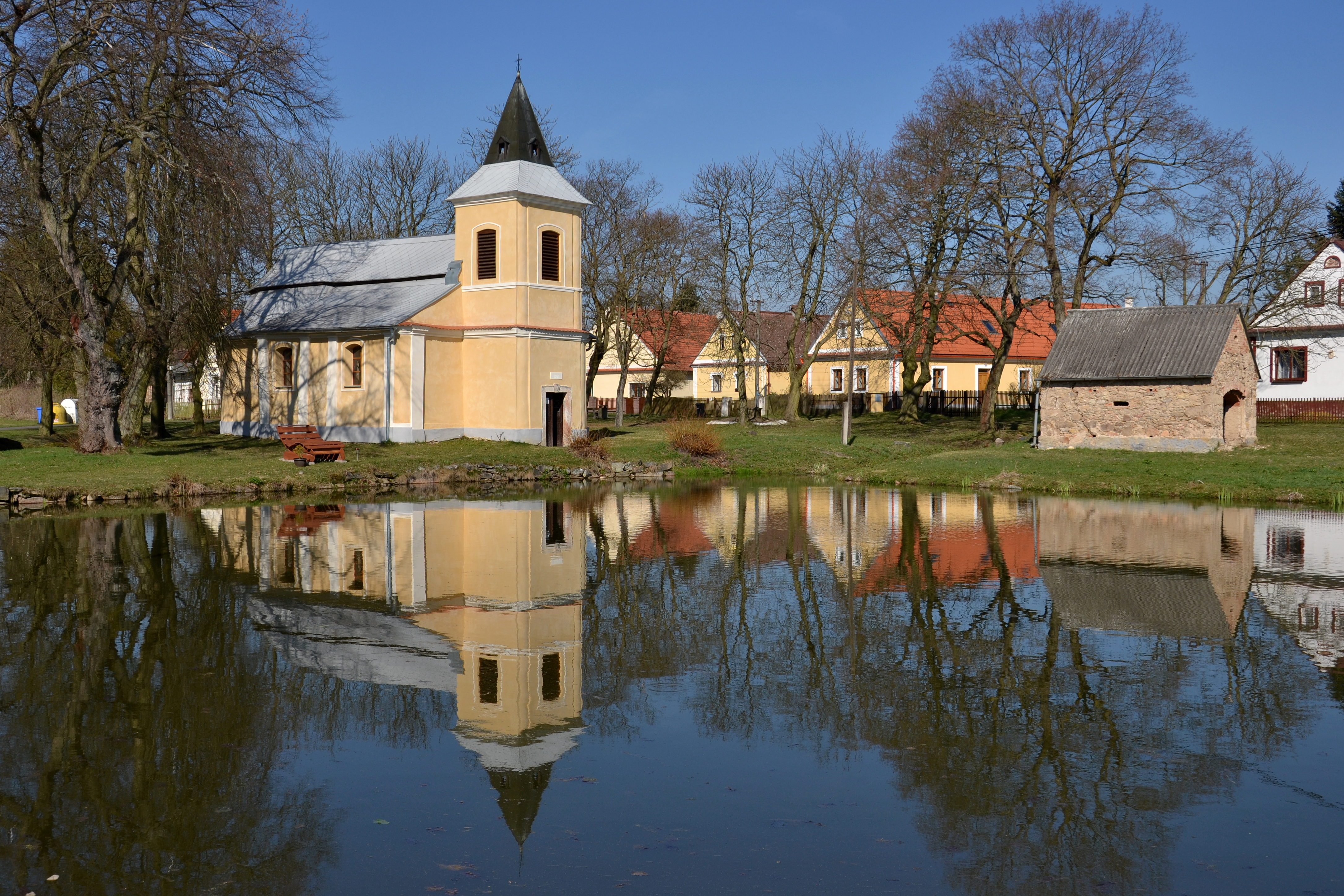 Otěvěky – kostel Nejsvětější Trojice